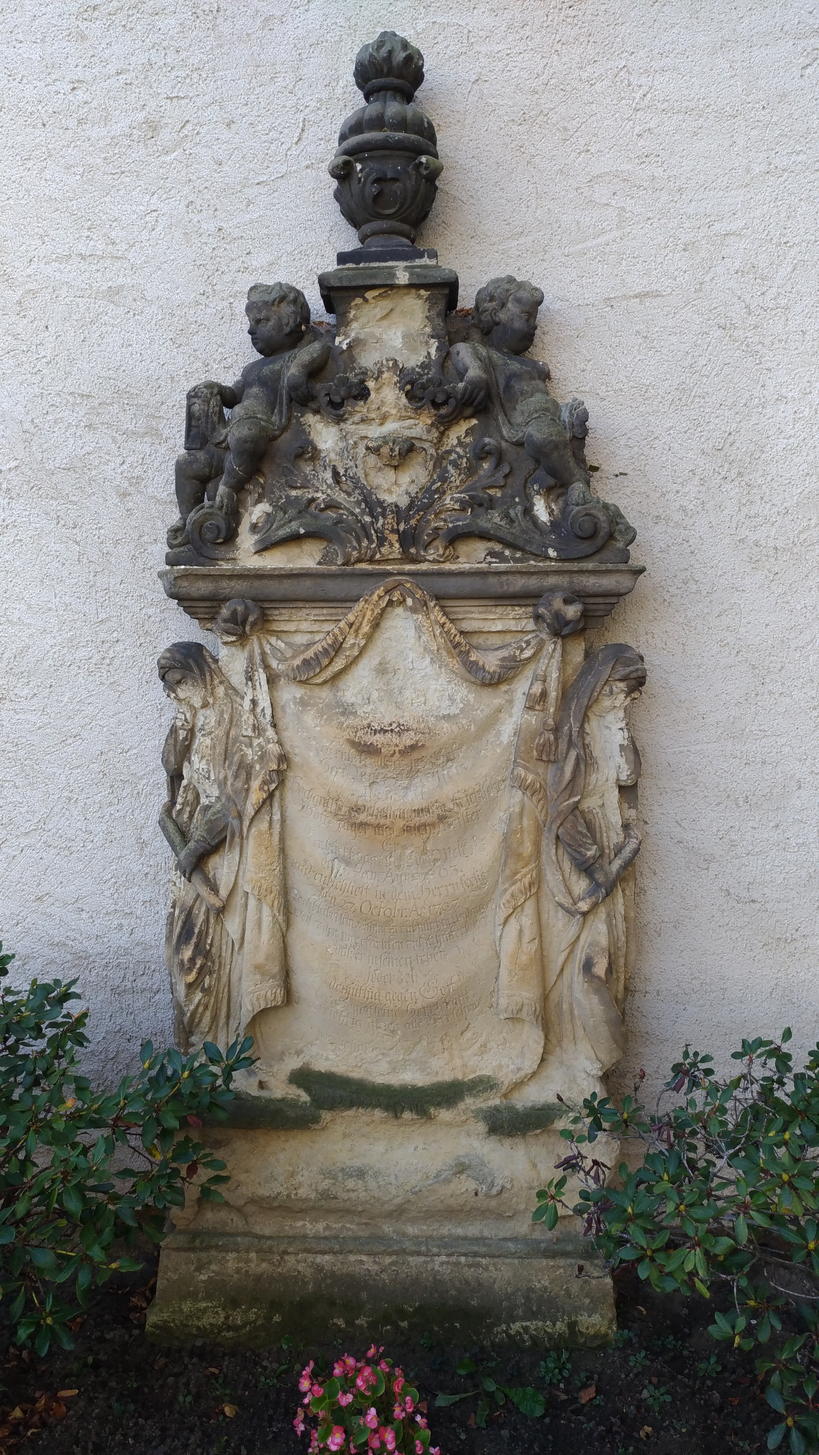 Grabmal des Hofjägers und Fischereimeisters der Standesherrschaft Königsbrück, Martin Keyser